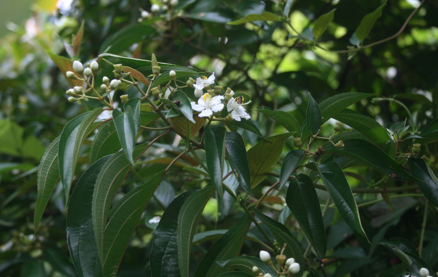 Miconia schlimii, Schwarzmundgewächse (Melastomataceae) - Costa Rica: Prov. Puntarenas, La Gamba NW Golfito, "Laguna" zwischen "Tropenstation La Gamba"/"Estación Biológica La Gamba" und "Esquinas Rainforest Lodge"